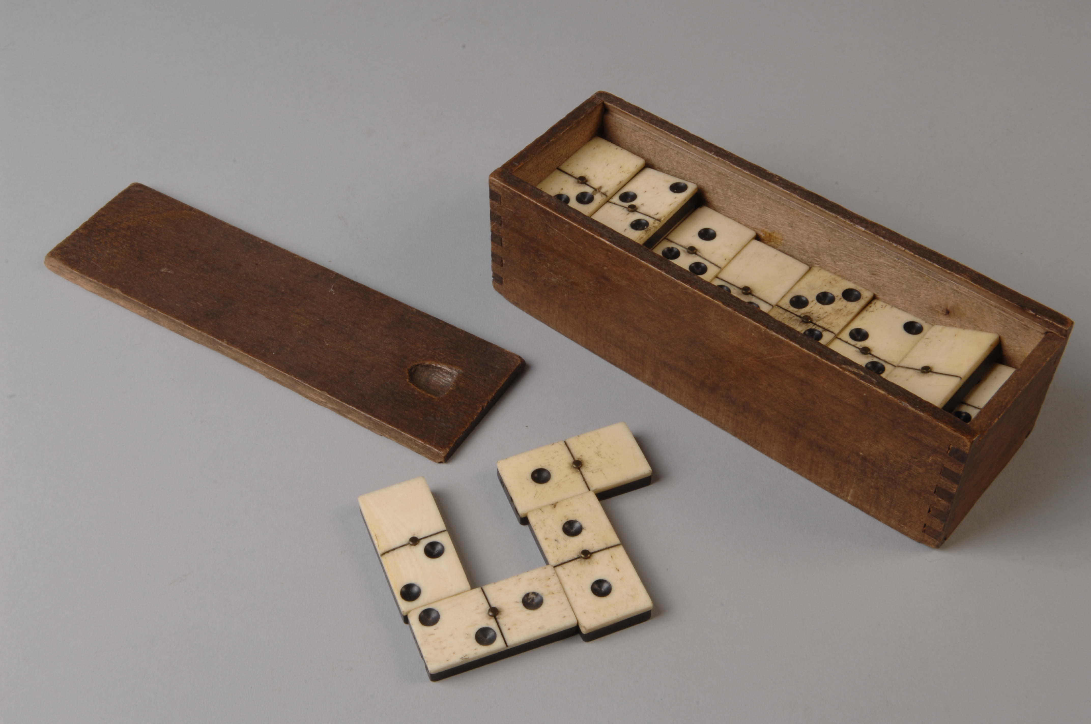 Objectgegevens Titel: Benen dominospel in houten doos Trefwoorden: dominospel, gezelschapsspel, spel, ontspanningsmiddel Datering: 1875 - 1940 Materiaal: been, metaal, hout Afmetingen: (cm) doos: hg 5,4 / br 6,0 / dp 17,7 / steen: hg 0,8 / br 2,0 / dp 4,5 Associatie: vrije tijd, spelen, domino Inventarisnr: Museum Rotterdam 77675